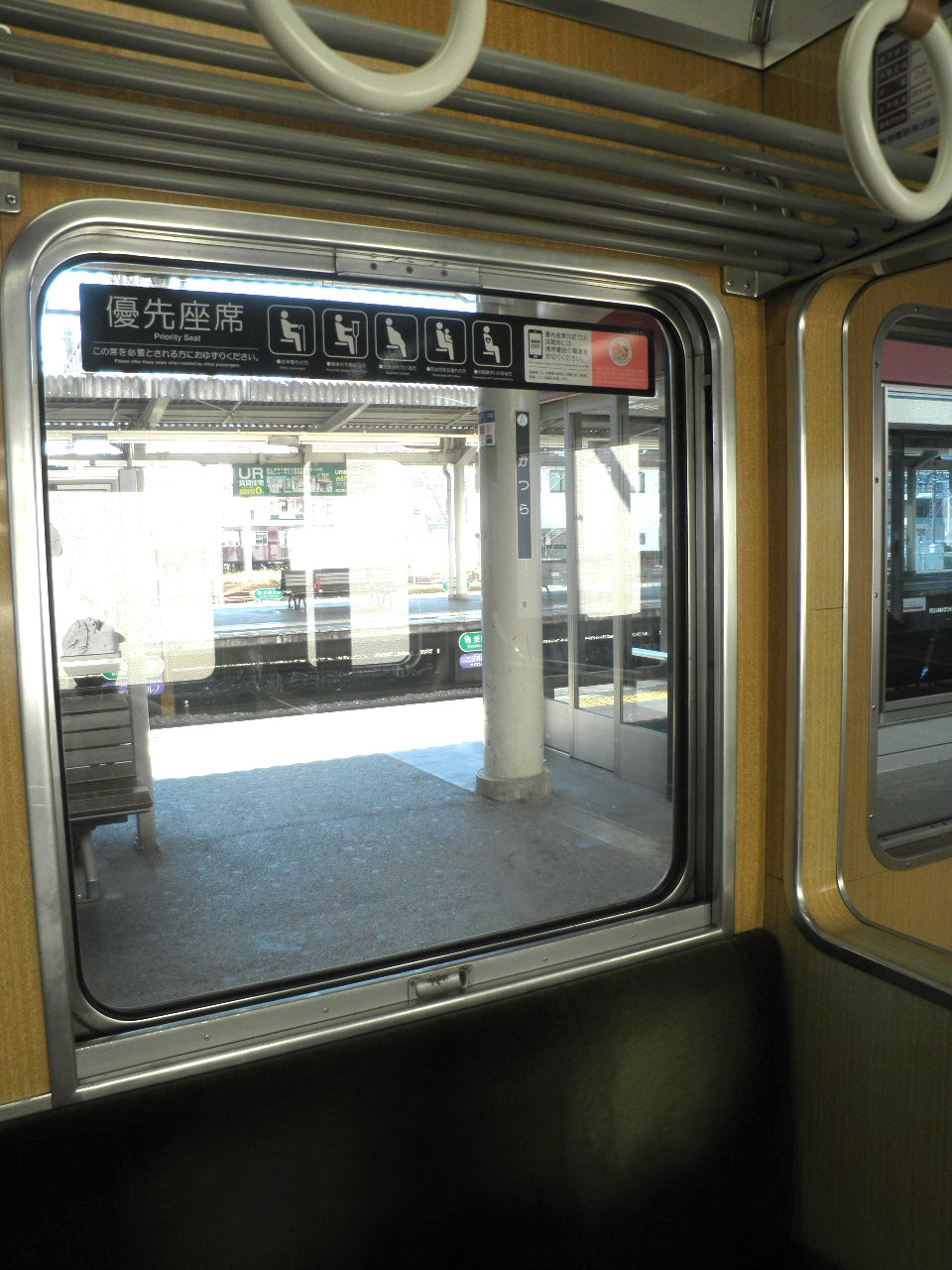 初期タイプの車両のフレーム付き側窓